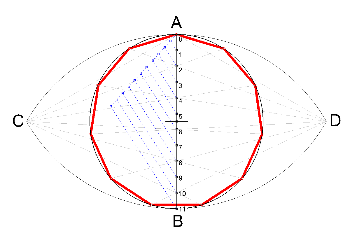 Processo de Rinaldini para a divisão da circunferência. No exemplo, 11 partes iguais.